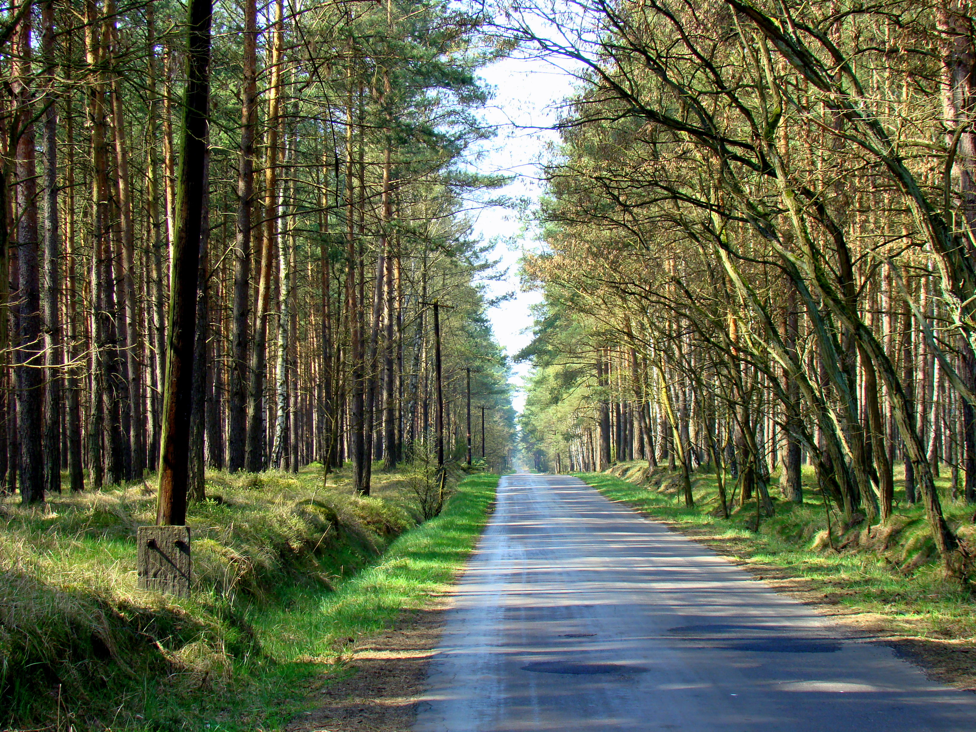 Puszcza Wkrzańska, Droga z Trzebieży do Myśliborza Wielkiego (Puszcza Wkrzańska), Powiat policki, Polska